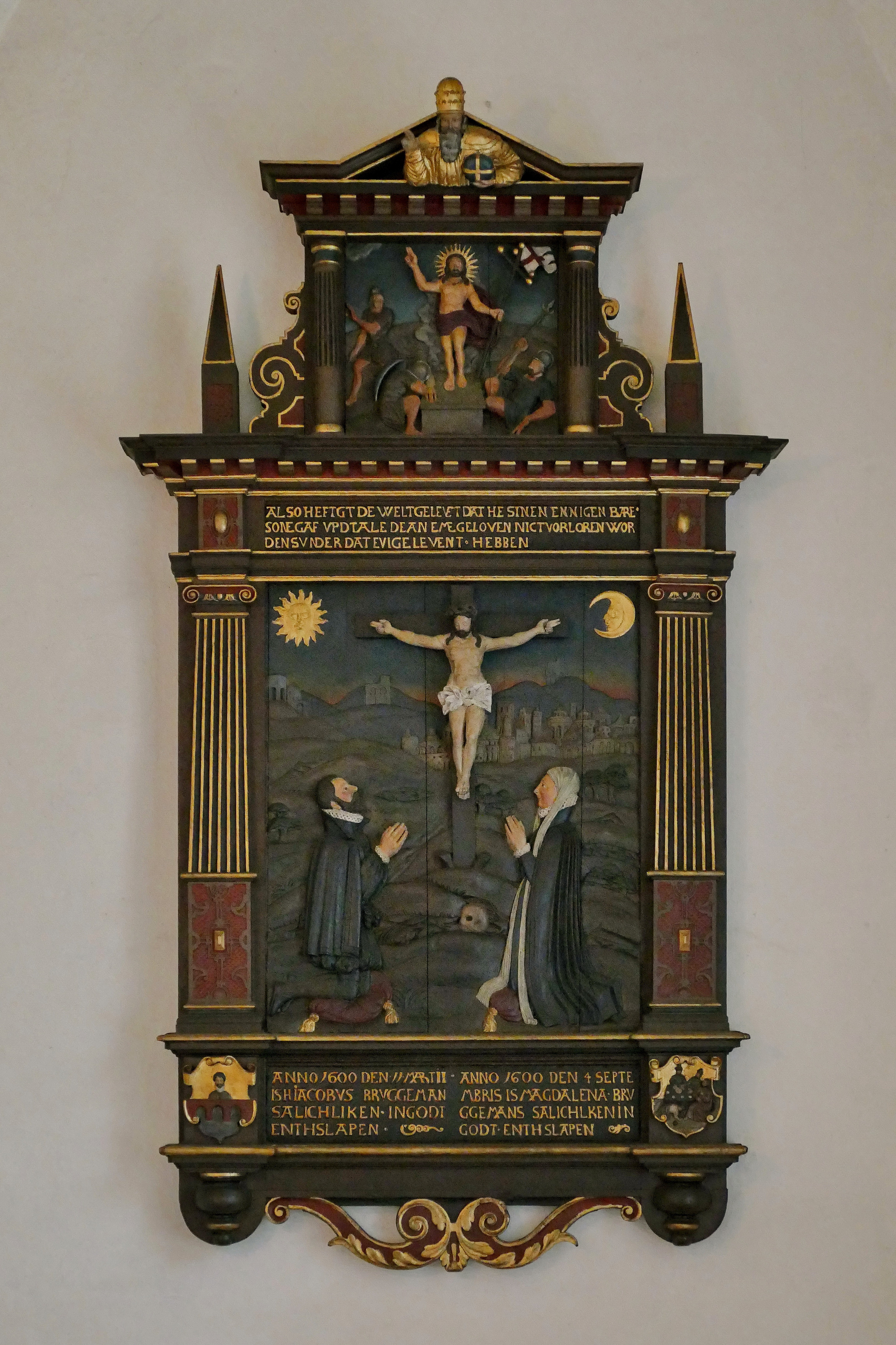 An der Westwand der St. Michaelis Kirche in Eutin befindet sich der Brüggemann-Epitaph von 1600.